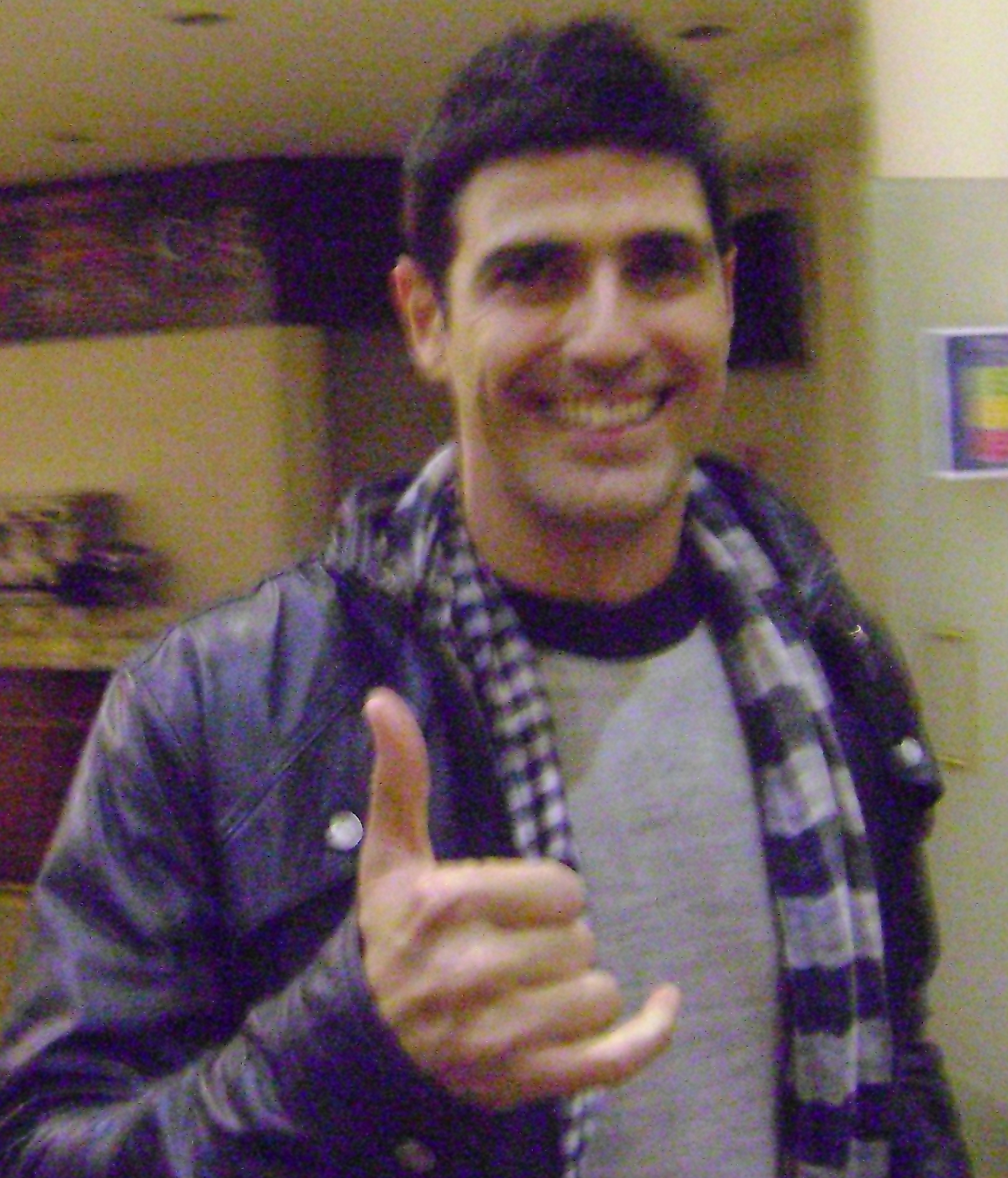 Reynaldo Gianecchini, ator brasileiro, após a apresentação da peça "Cruel", em São Paulo.